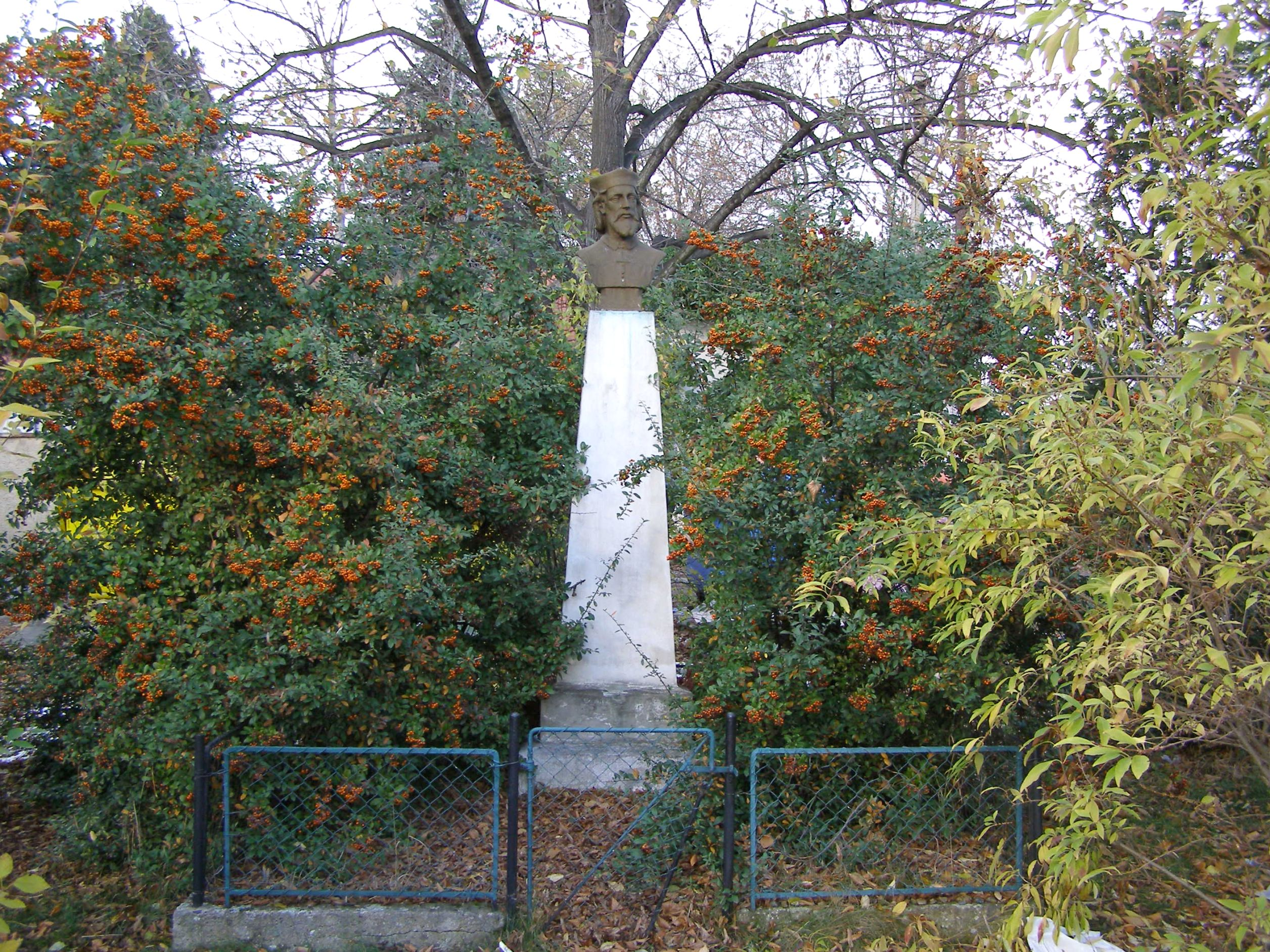 Pomník Mistra Jana Husa ve Zdibech